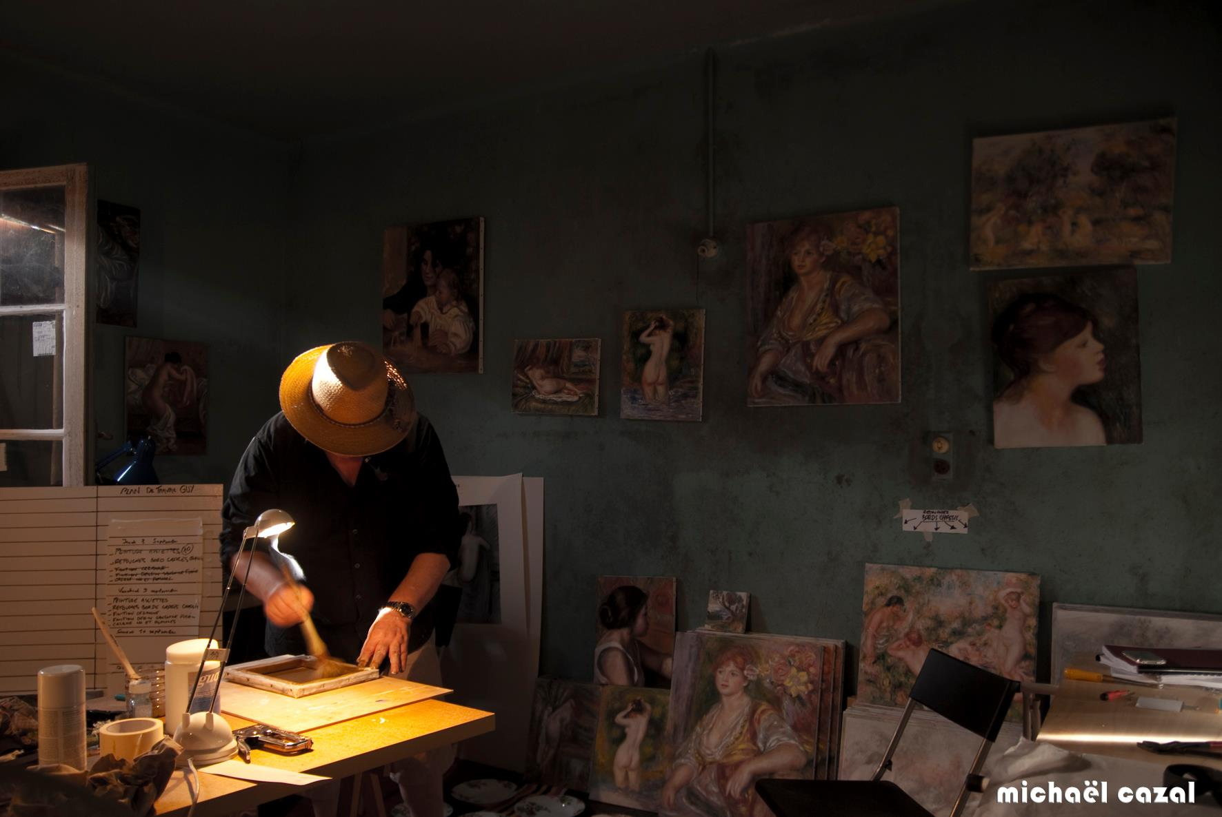 atelier de preparation pour le film